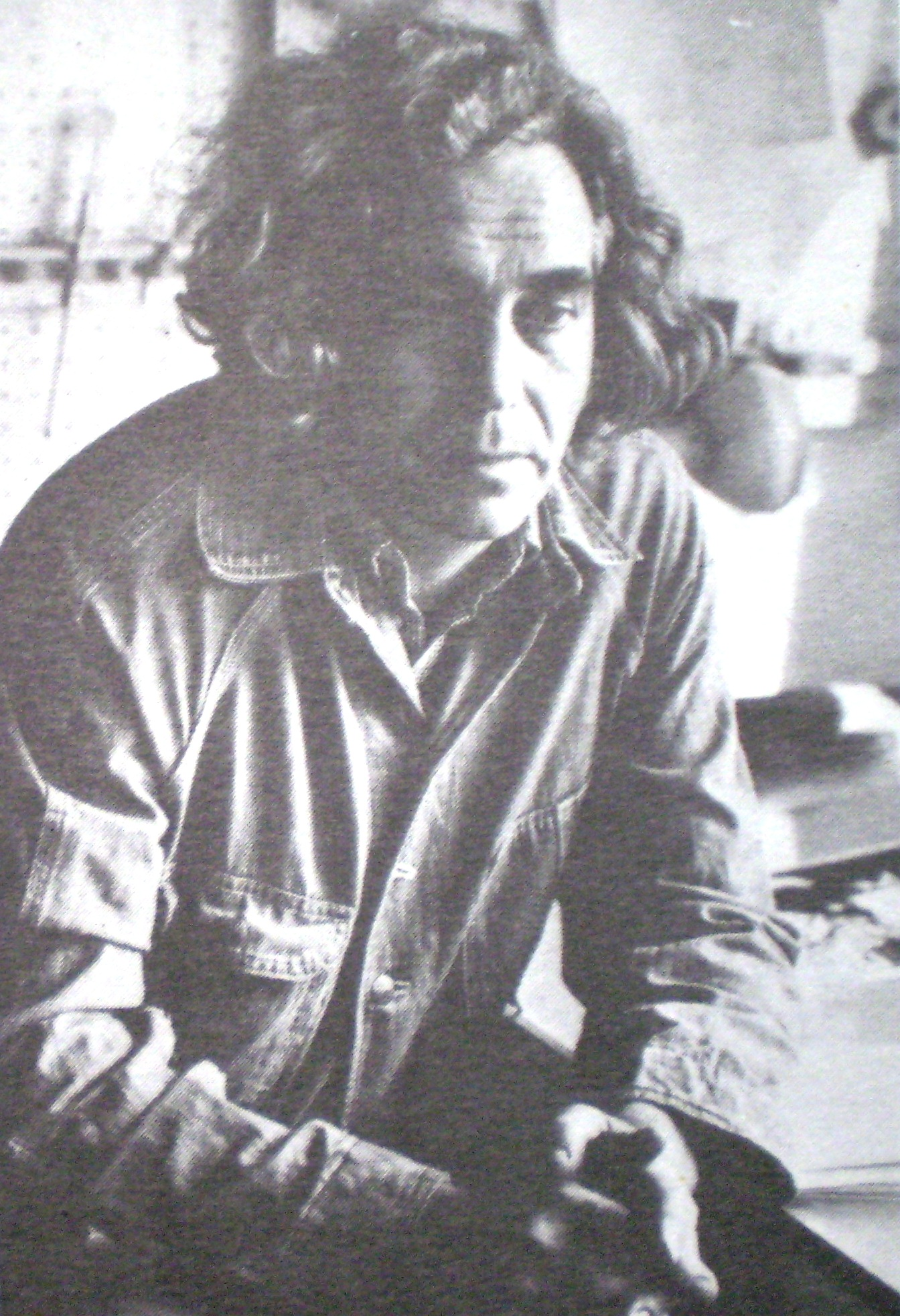 Carlos Alonso en 1979